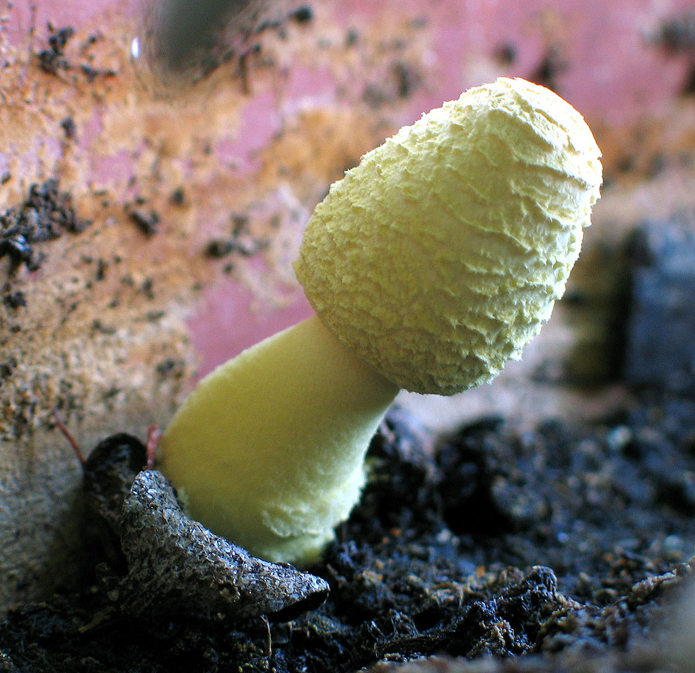 Gelber Faltenschirmling (lat. Leucocoprinus birnbaumii) in seinem (in mitteleuropäischen Breiten) natürlichen Umfeld 'Blumentopf'